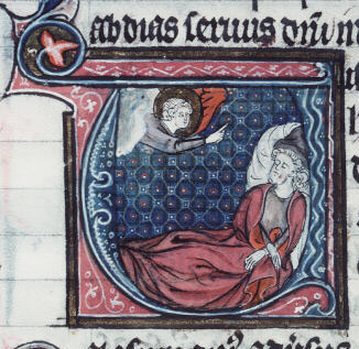 Dieu apparaissant en songe à Abdias. Livre d'Abdias, Bourges - BM - ms. 0007, f. 155v.